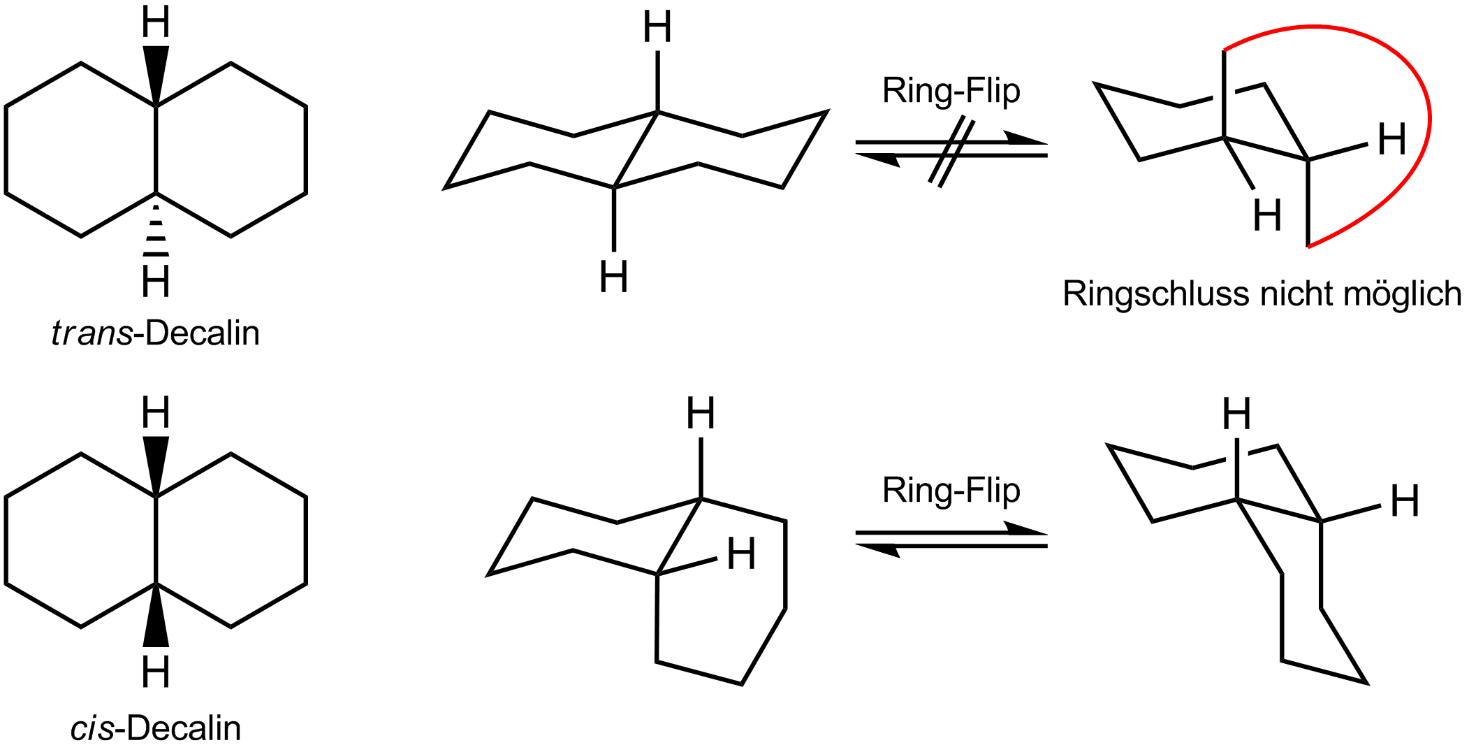 Ring-Flip-Konformere von "cis"- und "trans"-Decalin